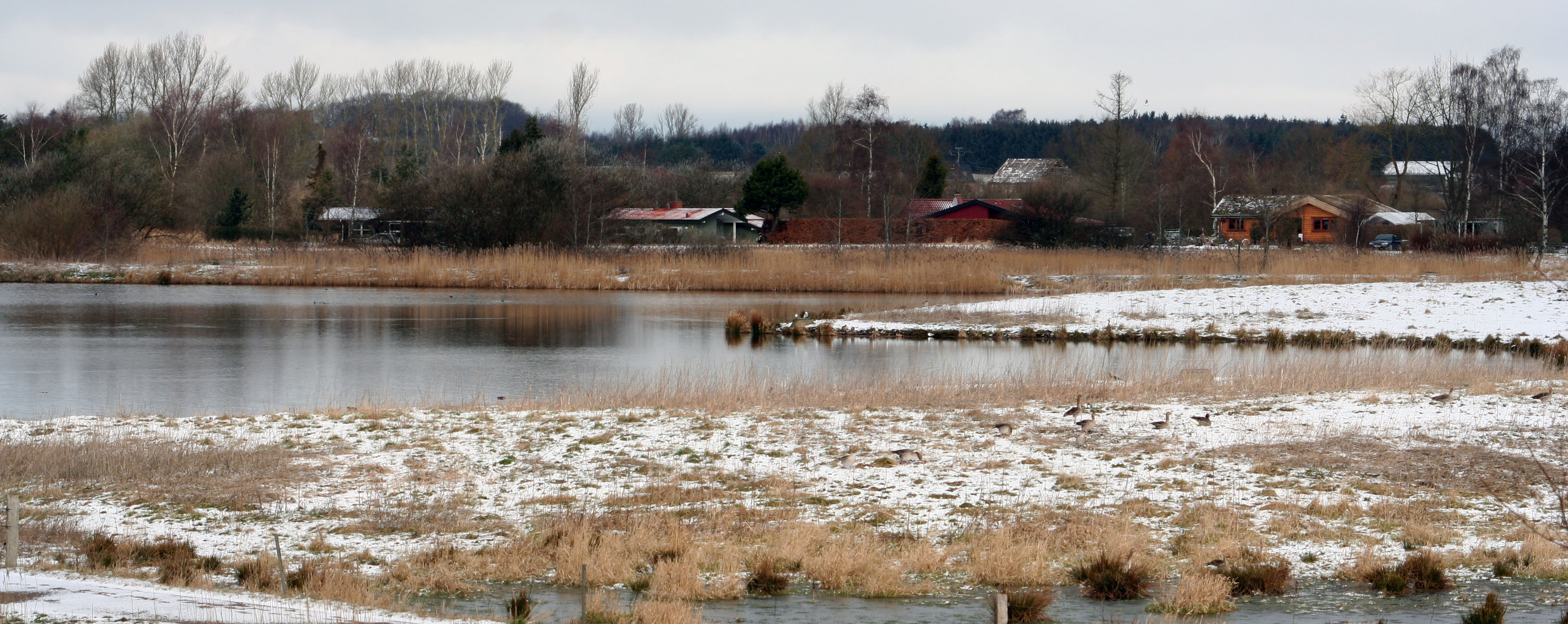 Pøleå gennemløber Strødam. Blishøns, grågæs, måger.